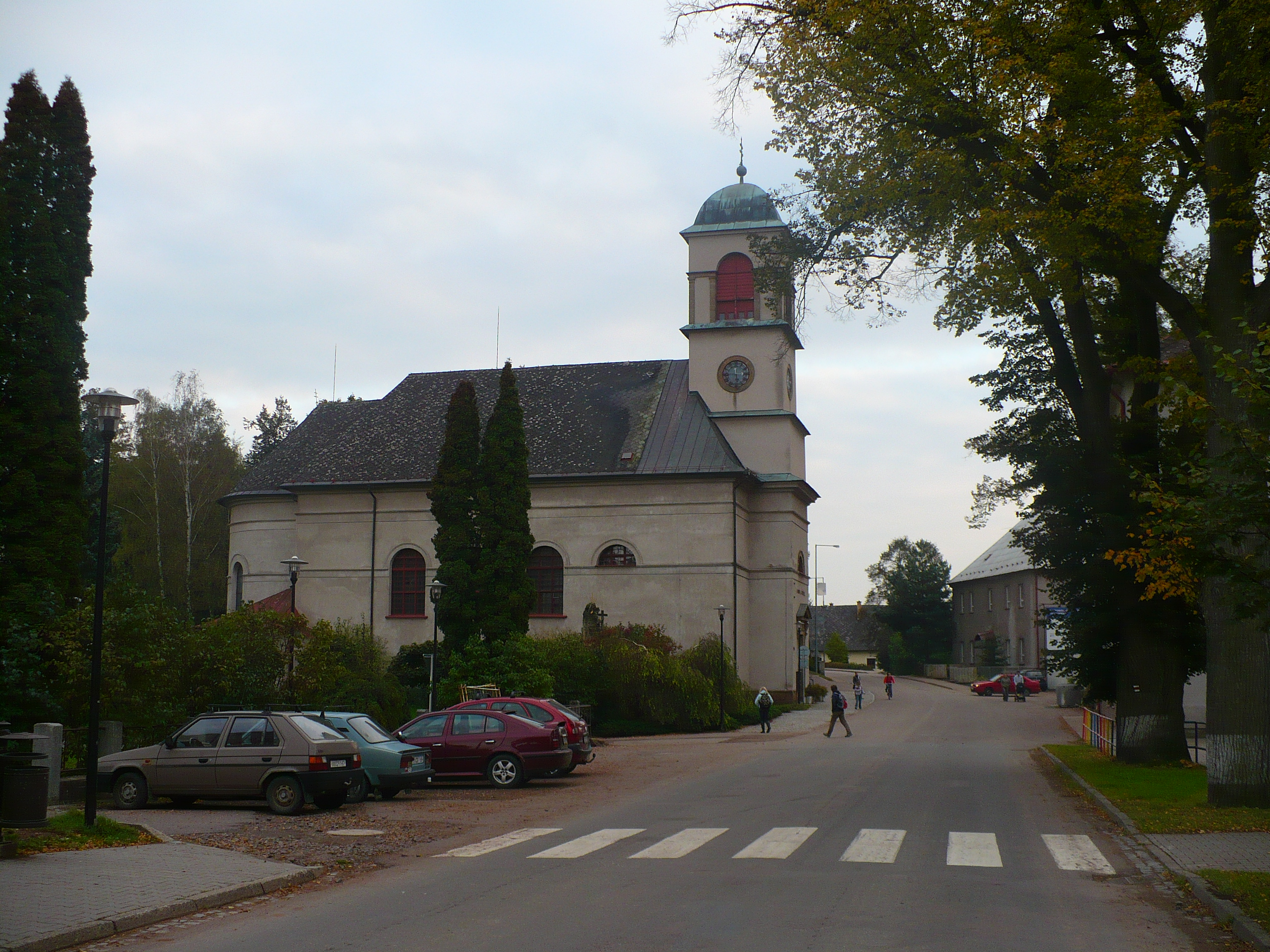 Kostel sv. Mikuláše v Dolní Dobrouči